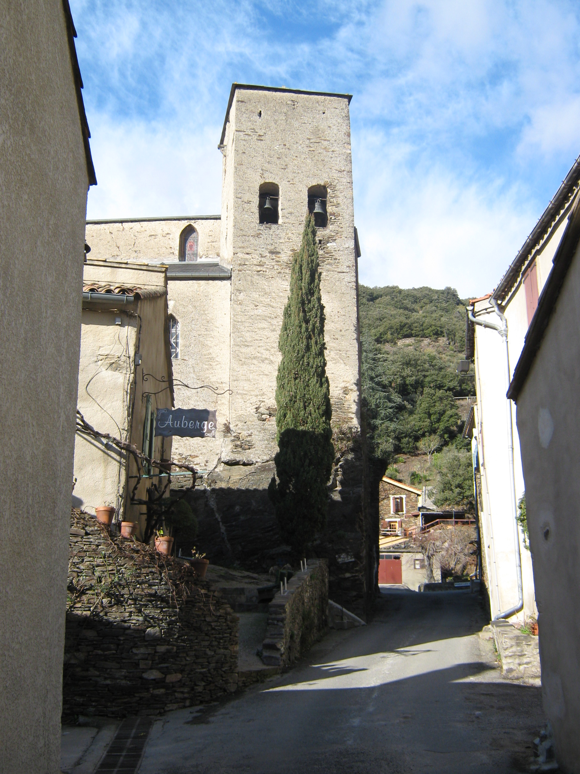 Campanar de l'església de Rocafera